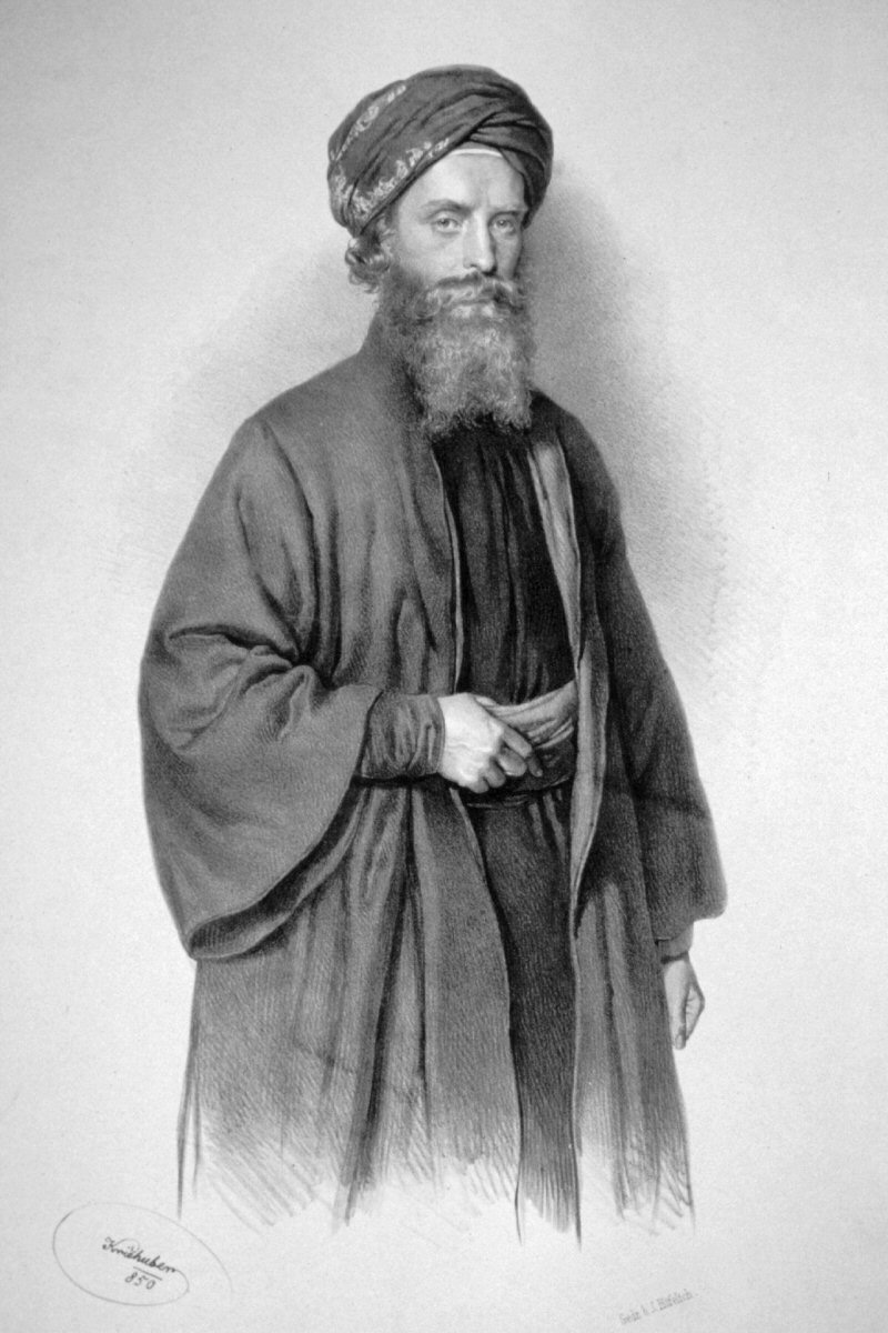 Ignaz Knoblecher, Lithographie von Joseph Kriehuber, 1850. Ignazio Knoblecher Litografia di Joseph Kriehuber, 1850